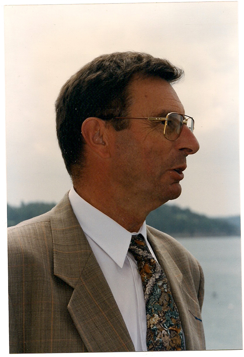 Jean L'Helgouach